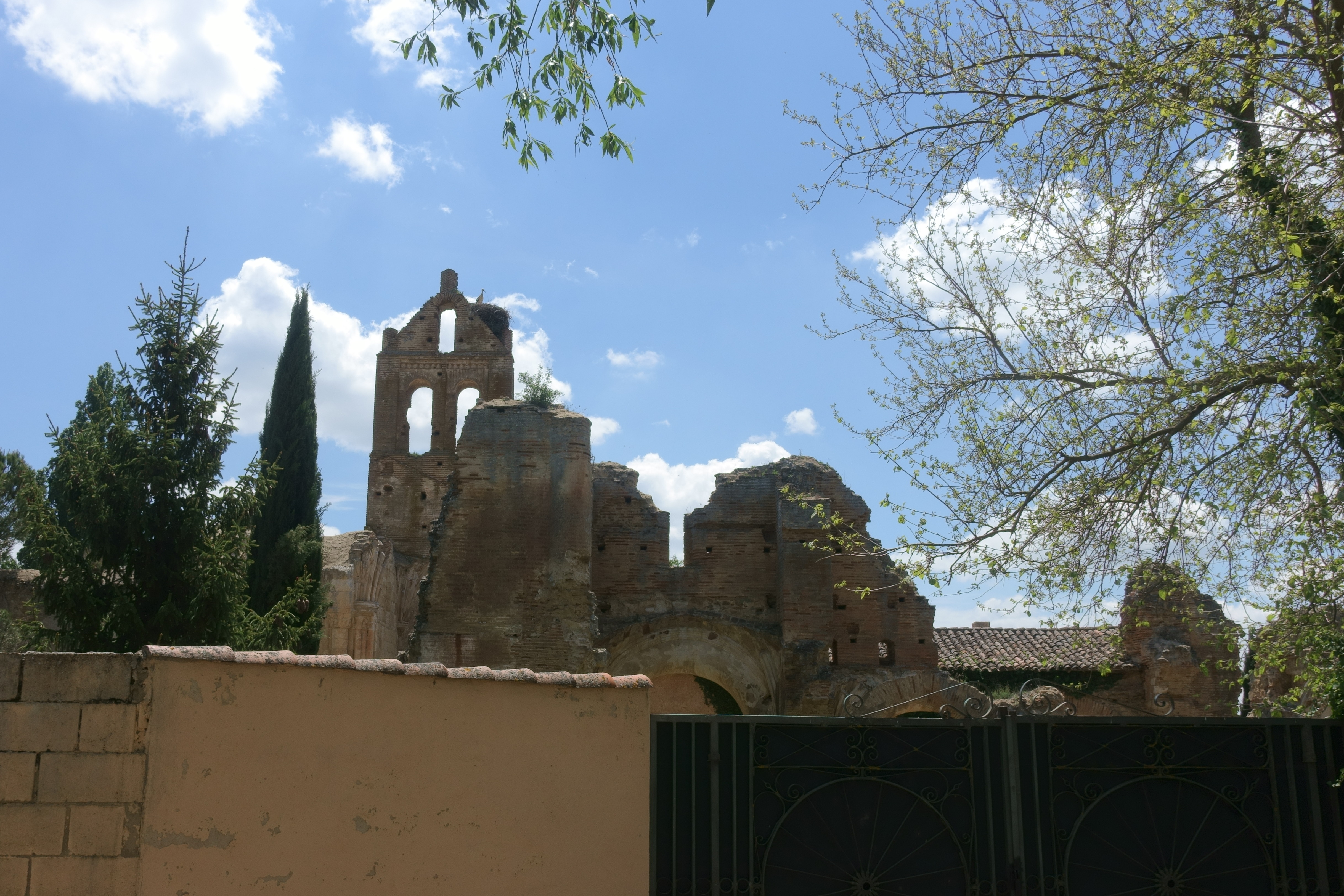 Vista parcial exterior del monasterio de Santa María de Trianos, en Villamol (León, España).